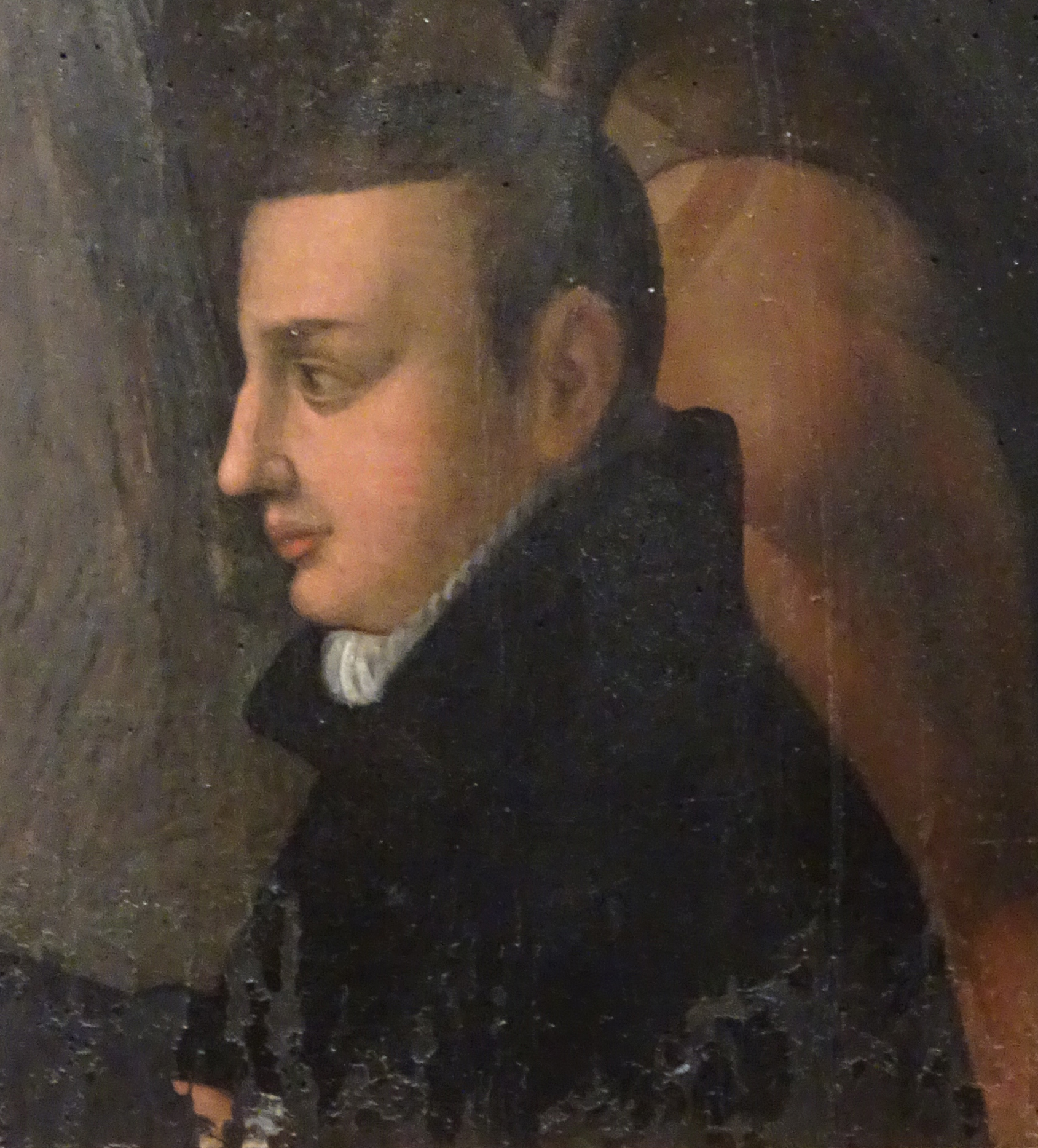 Ausschnitt aus dem Epitaph für Christoph Finolt aus der Universitätskirche St. Pauli zu Leipzig, welches wahrscheinlich den Verstorbenen zeigt